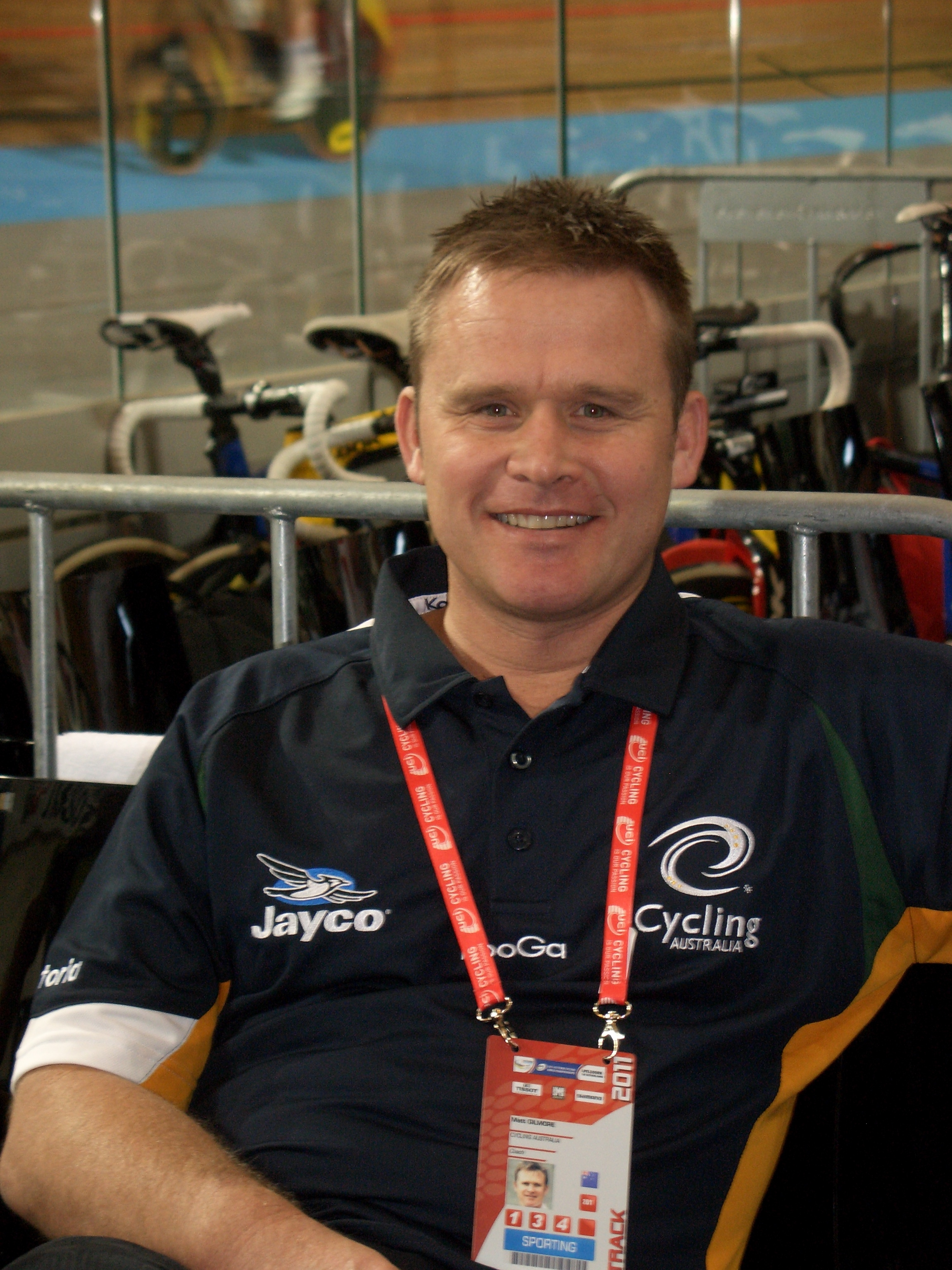 Matthew Gilmore, belgisch-australischer Radrennfahrer